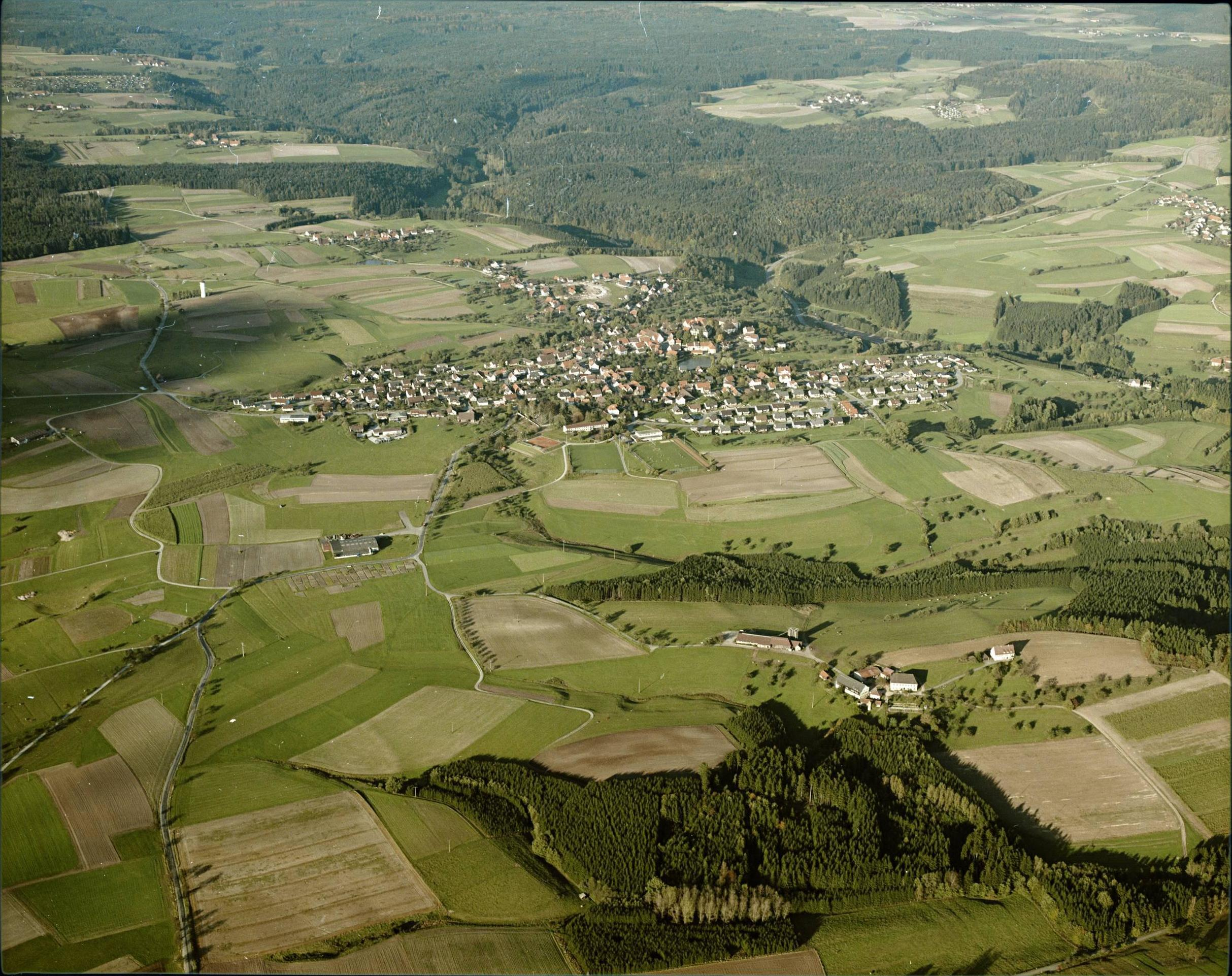 Luftbild von Adelmannsfelden - Staatsarchiv Sigmaringen - Archivalieneinheit N 1/96 T 1 Nr. 577